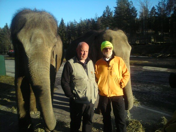 Robert Aschberg and Gert Fylking with king Carl XVI Gustafs elephants Saonoi and Bua in Kolmarden Zoo